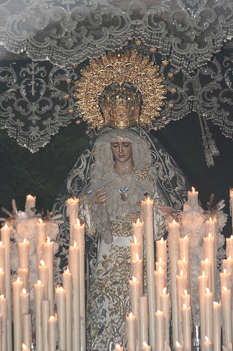 Nuestra Señora de la Candelaria, Luz del Martes Santo Sevillano. Semana Santa en Sevilla. Año 2006 Foto realizada y propiedad de Ángel Cachón